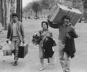 Emigrantes españoles de los años 60